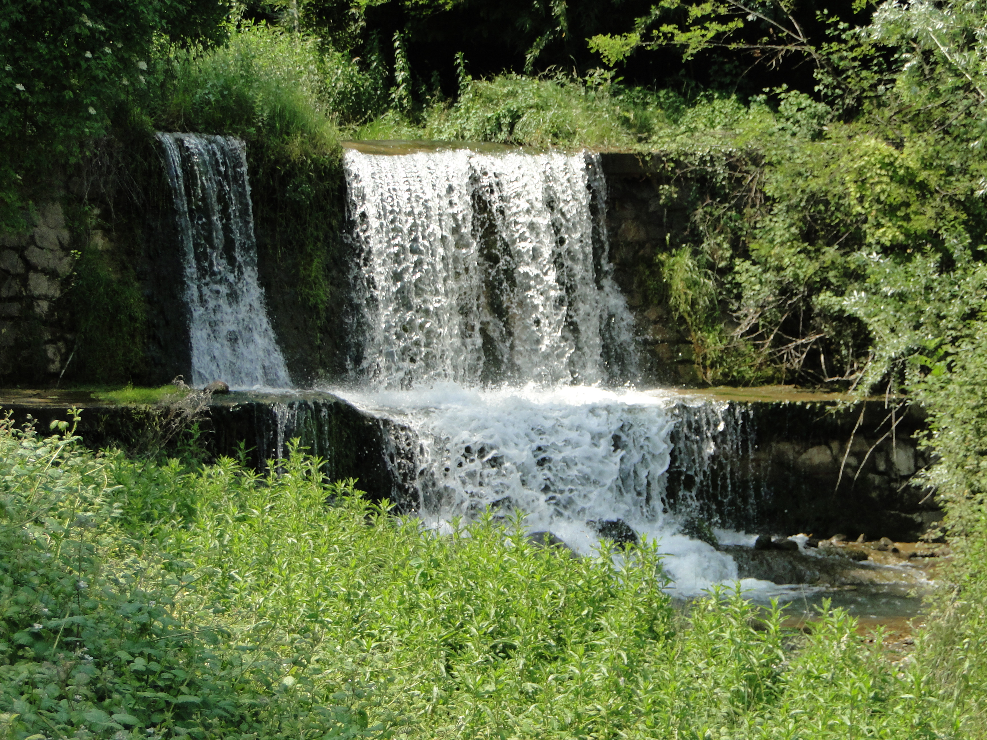 torrente Rovaro, tra Gazzaniga ed Albino (BG), Italia